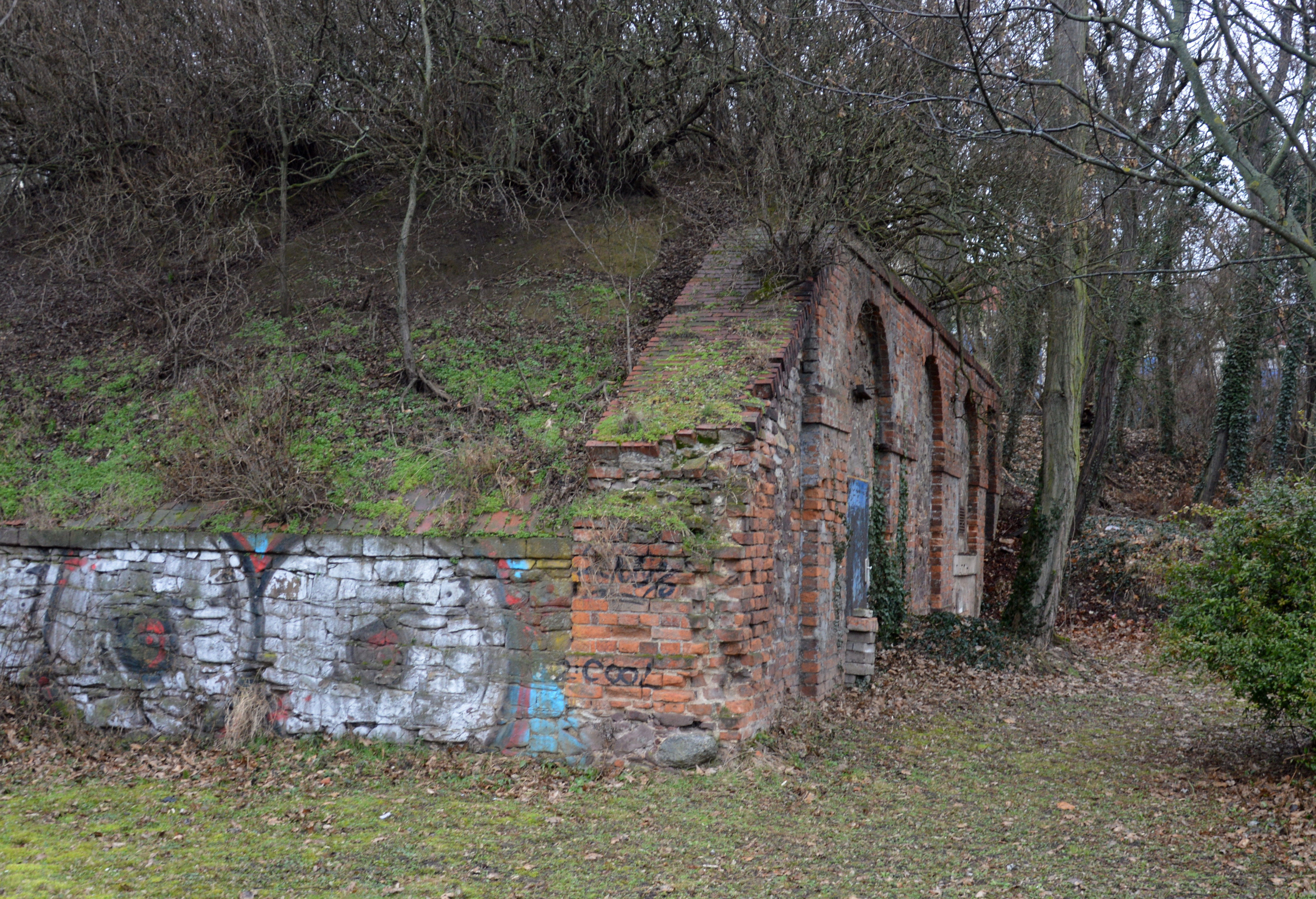 Bastion Hessen